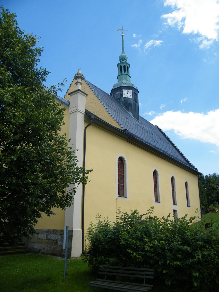 Engelkirche in Hinterhermsdorf